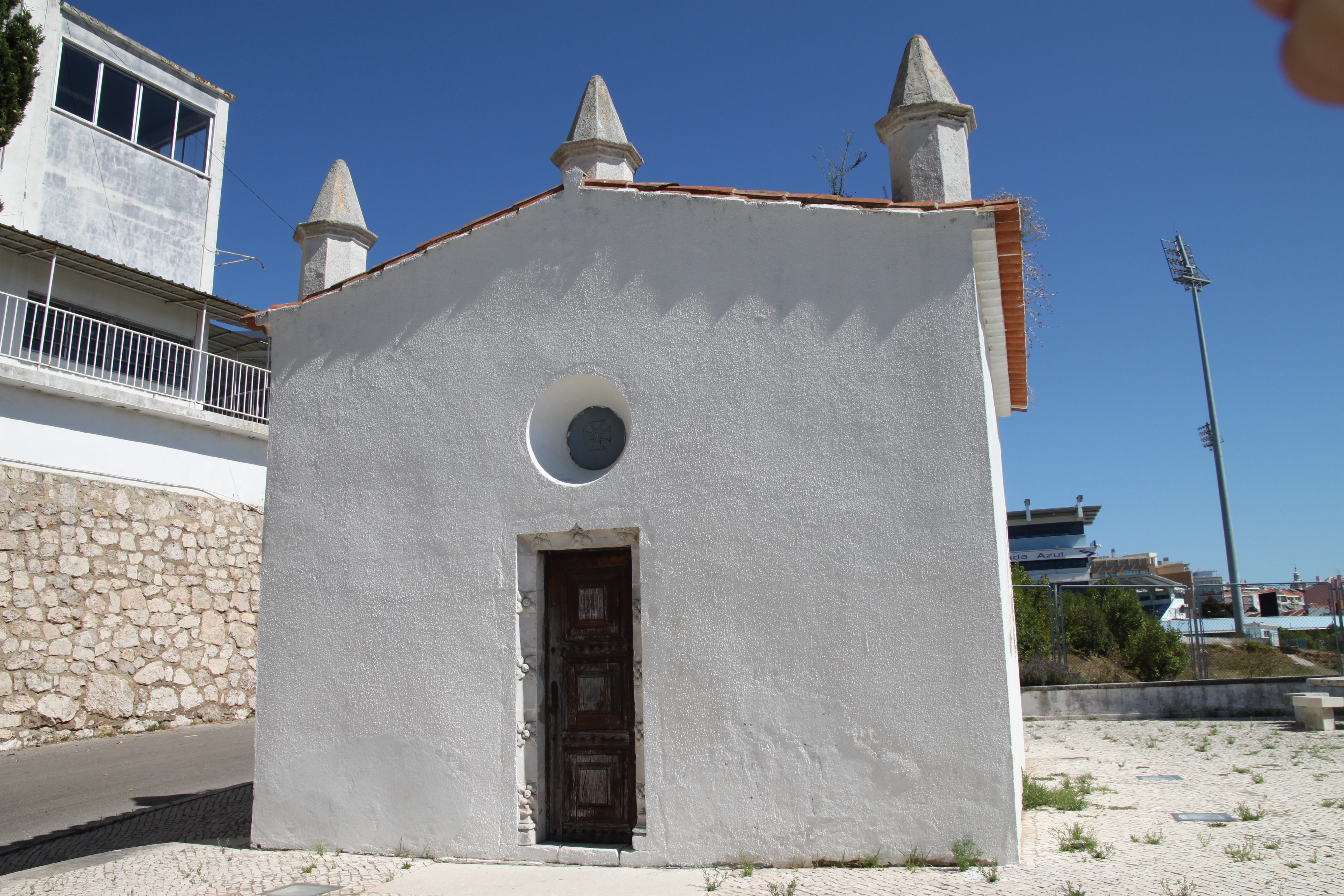 Capela ou Ermida do Santo Cristo This file was uploaded for Wiki Loves Monuments in Portugal with the unique identifier 74576.